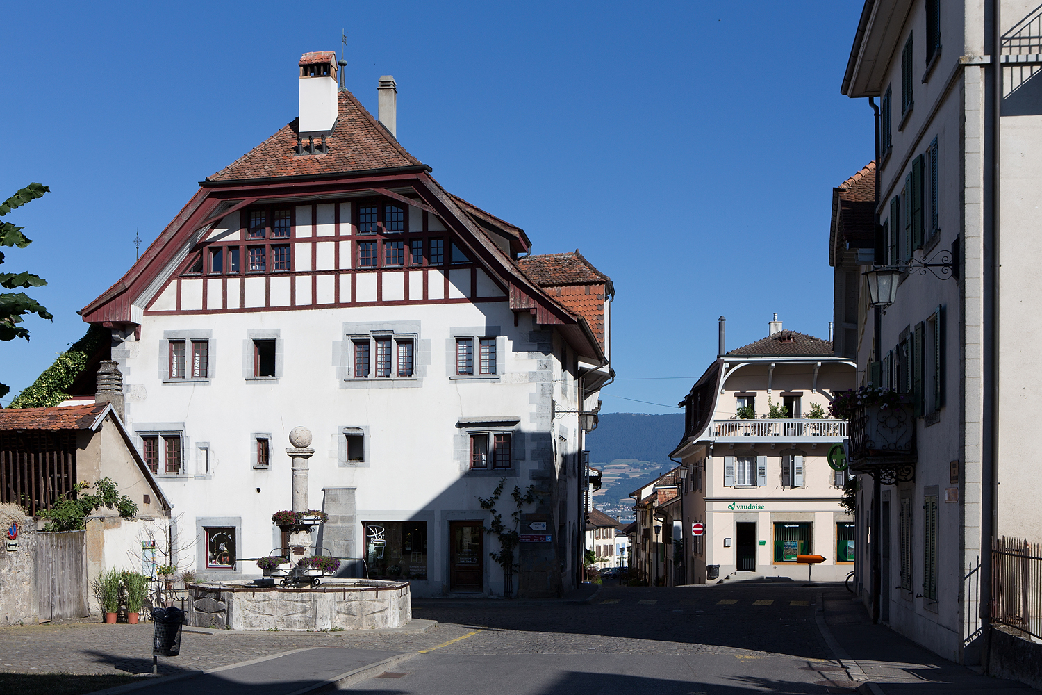 Kulturgeschütztes Wohnhaus an der Rue du Musée in Estavayer-le-Lac (FR) mit Blick zur Rue du Four